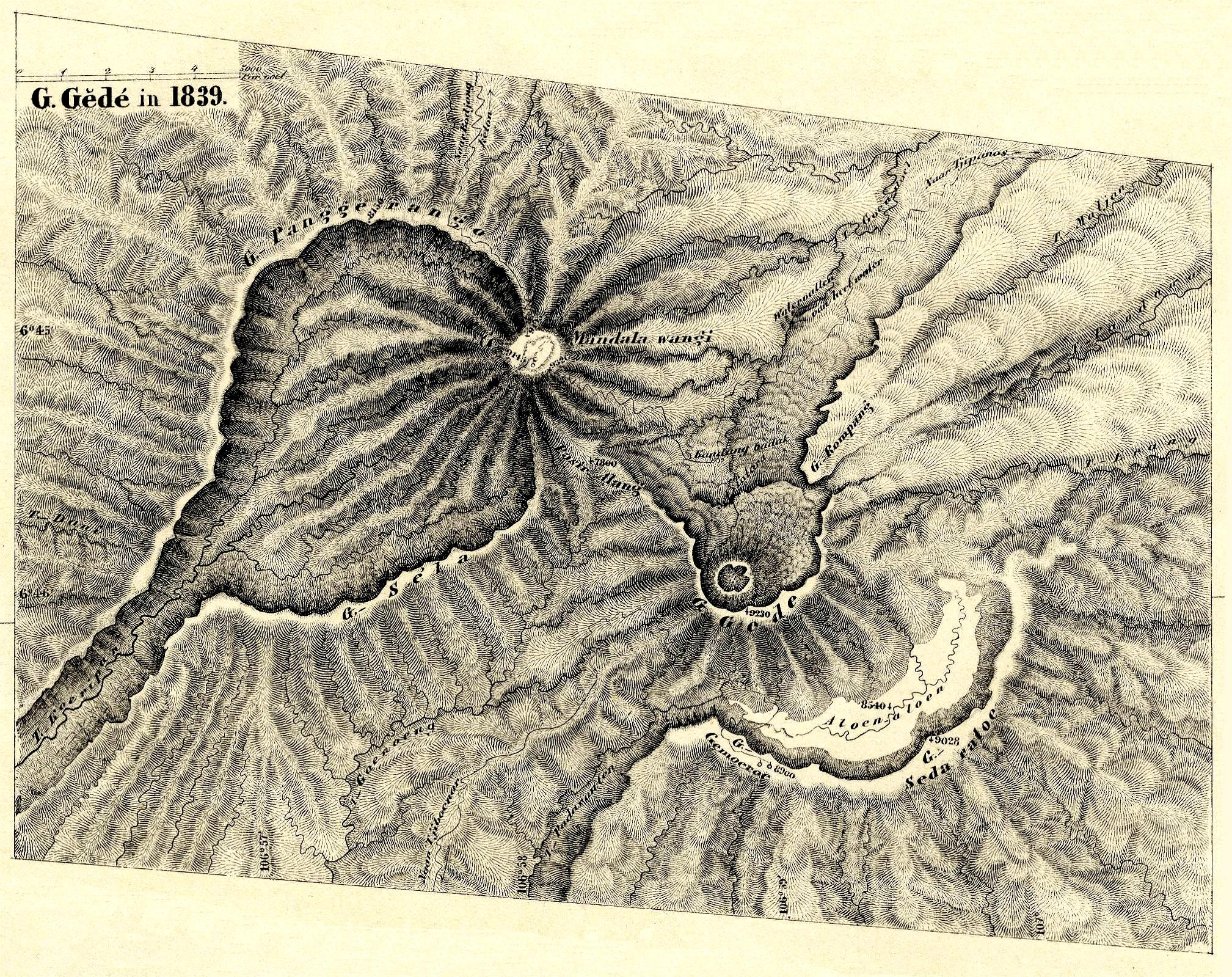 Vulkanmassiv Gede-Pangrango (Ausschnitt der Gipfelregion)